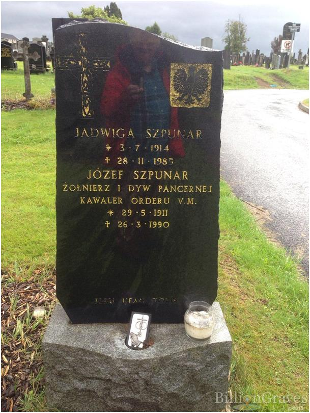 Nagrobek Józefa Szpunara na cmentarzy Dalbeth w Glasgow